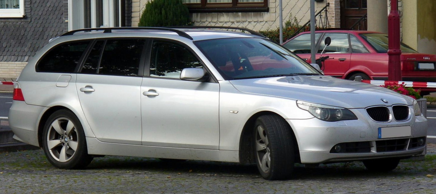 BMW 5er Touring